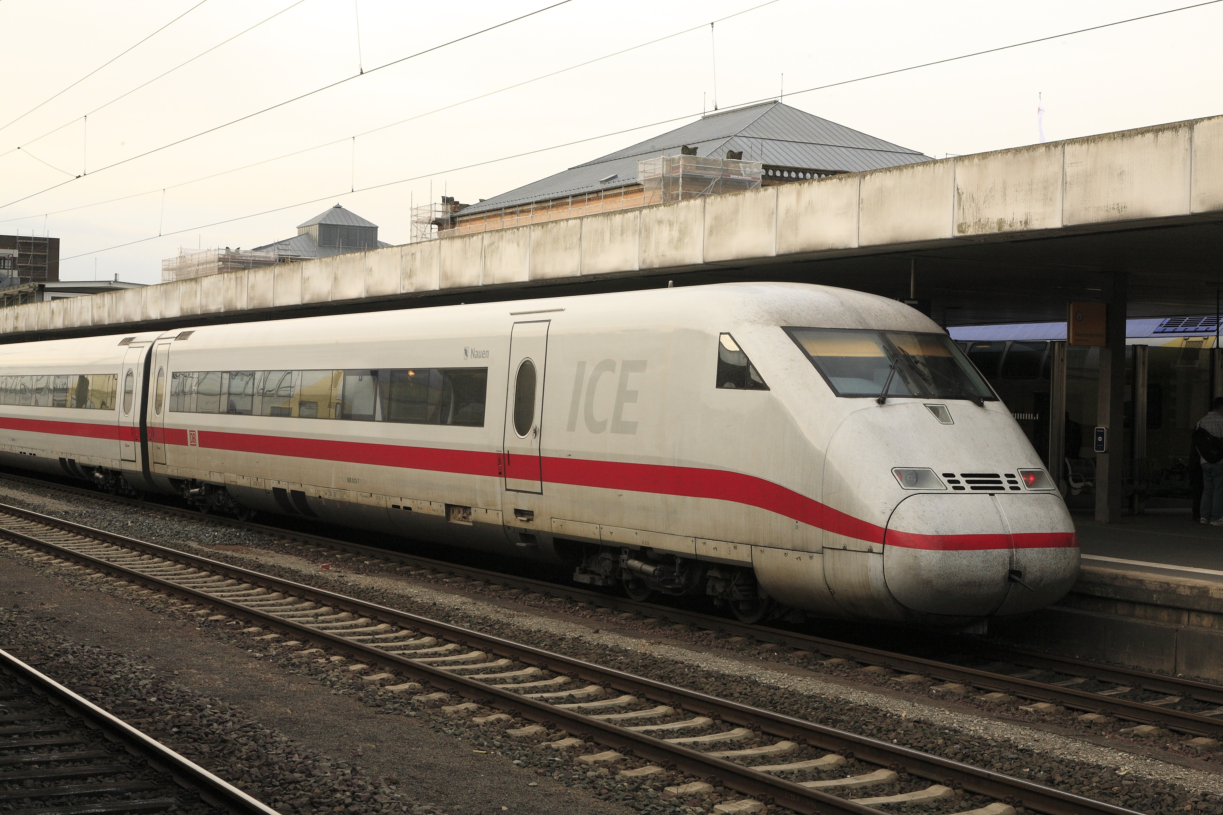 ICE2-Steuerwagen. Diese wurden erst etwa zwei Jahre nach dem Triebköpfen und Mittelwagen geliefert. Auffällig ist die Dachausrundung mit geringerem Radius, durch die die Züge etwas ungleichmäßig aussehen. Als Folge sind auch die Einstiegstüren nicht austauschbar.